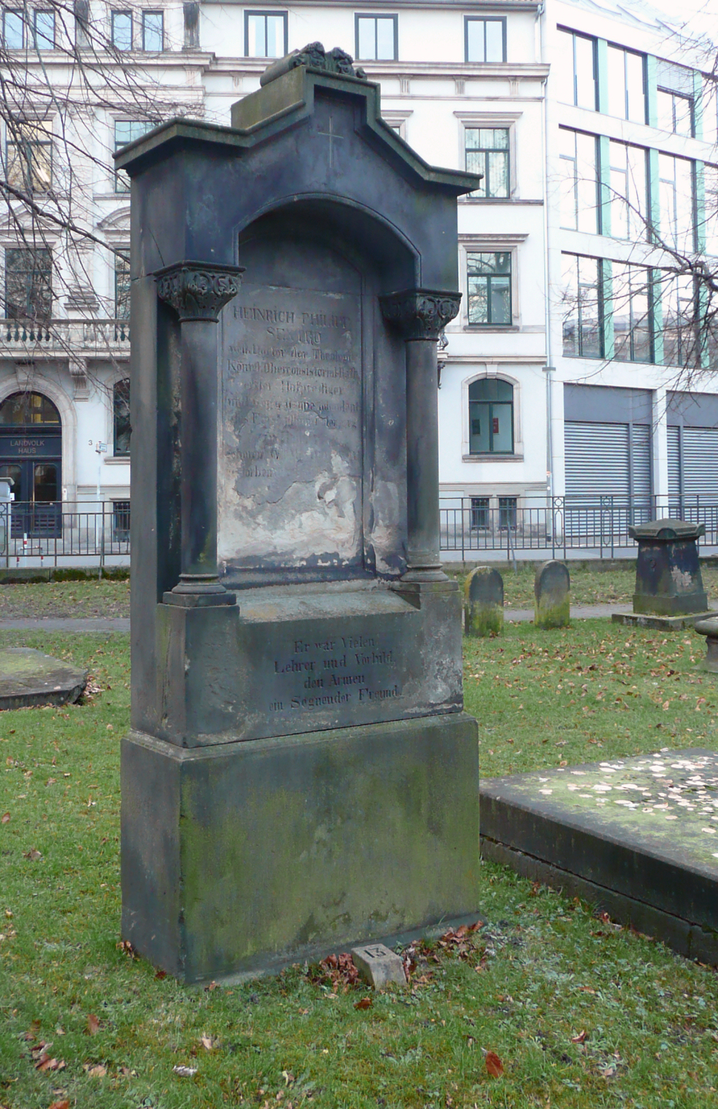 Grab von Heinrich Philipp Sextro auf dem Gartenfriedhof